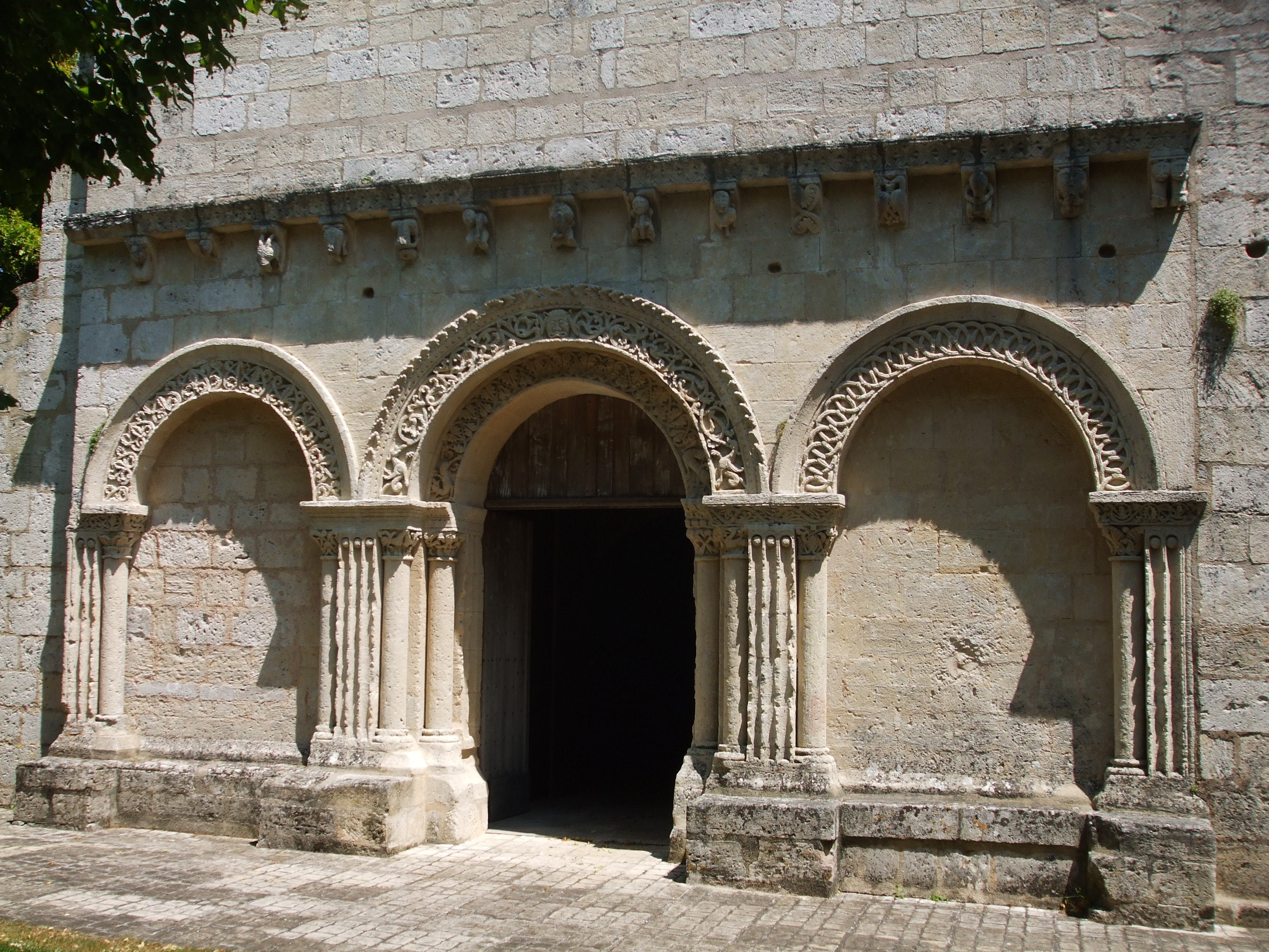 Église Saint-Alban de Bresdon (Inscrit) .